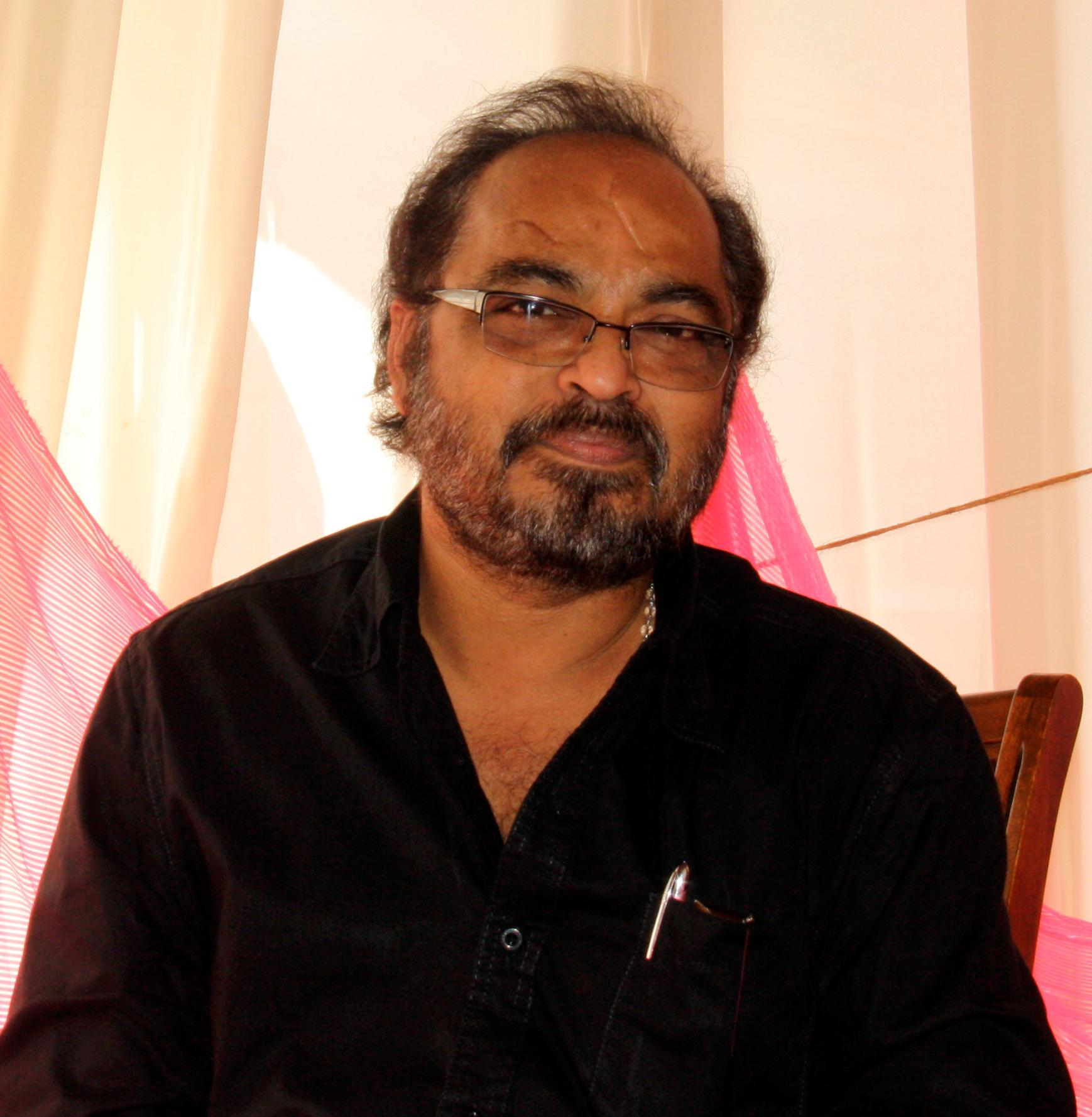 മലയാള സംഗീത സംവിധായകനായ ജോൺസൺ